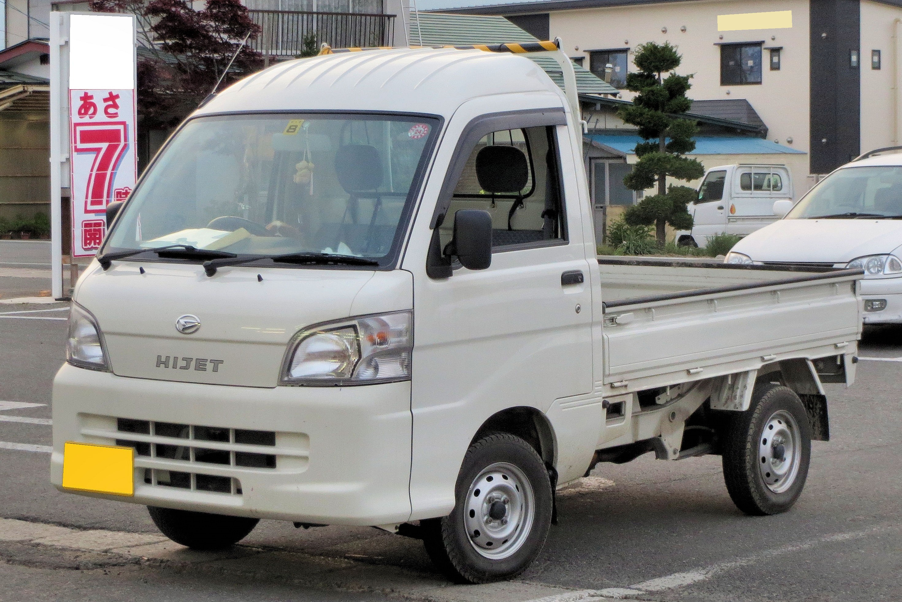 ダイハツ ハイゼットトラック ハイルーフ 4WD(211P・後期型)